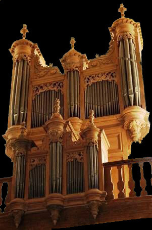 Jeu d'orgues de l'Abbaye de Maizières par Julien Tribuot 1699_ Transféré à l'Église de Seurre en 1791, restauré en 1991.